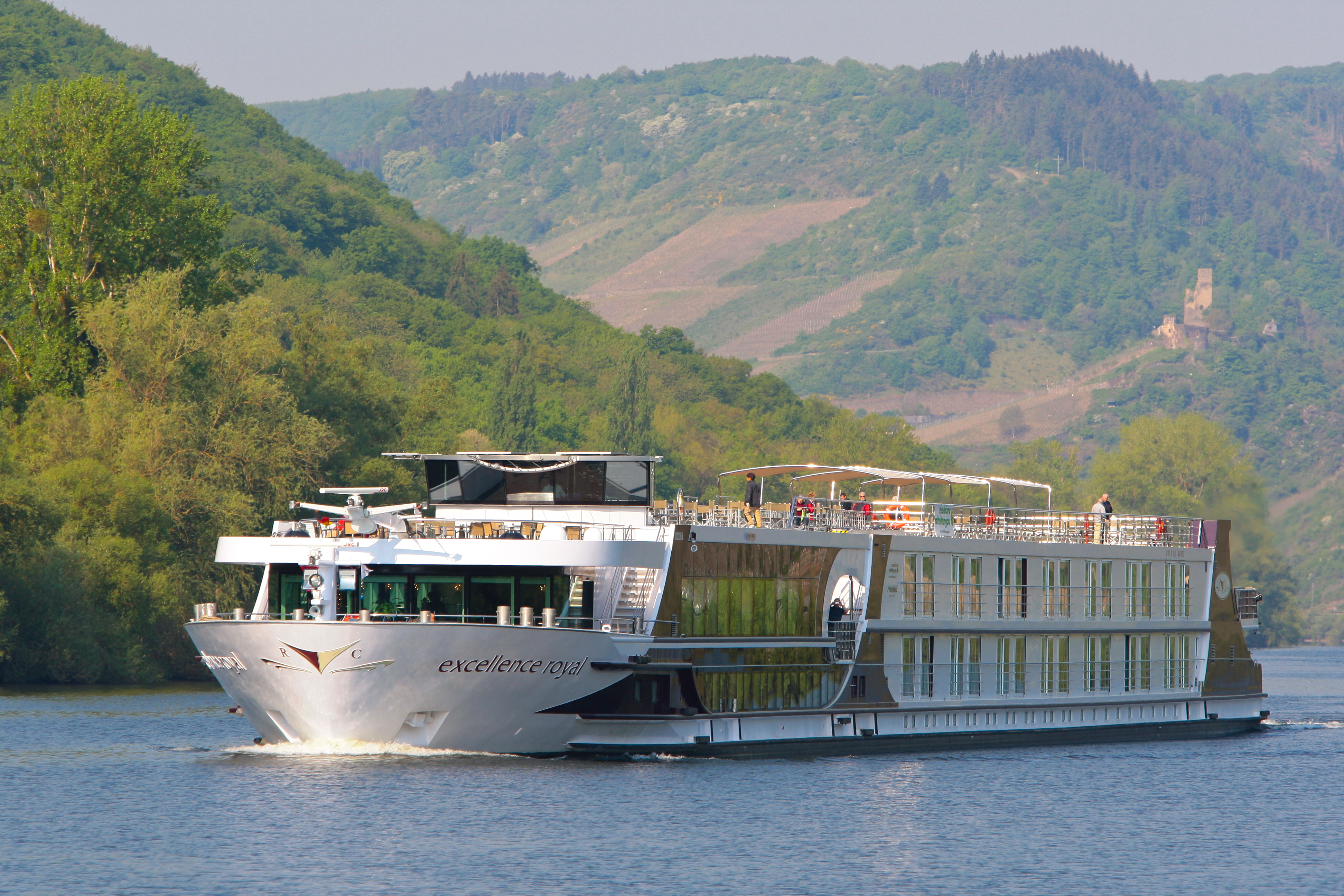 Die Excellence Royal auf der Mosel